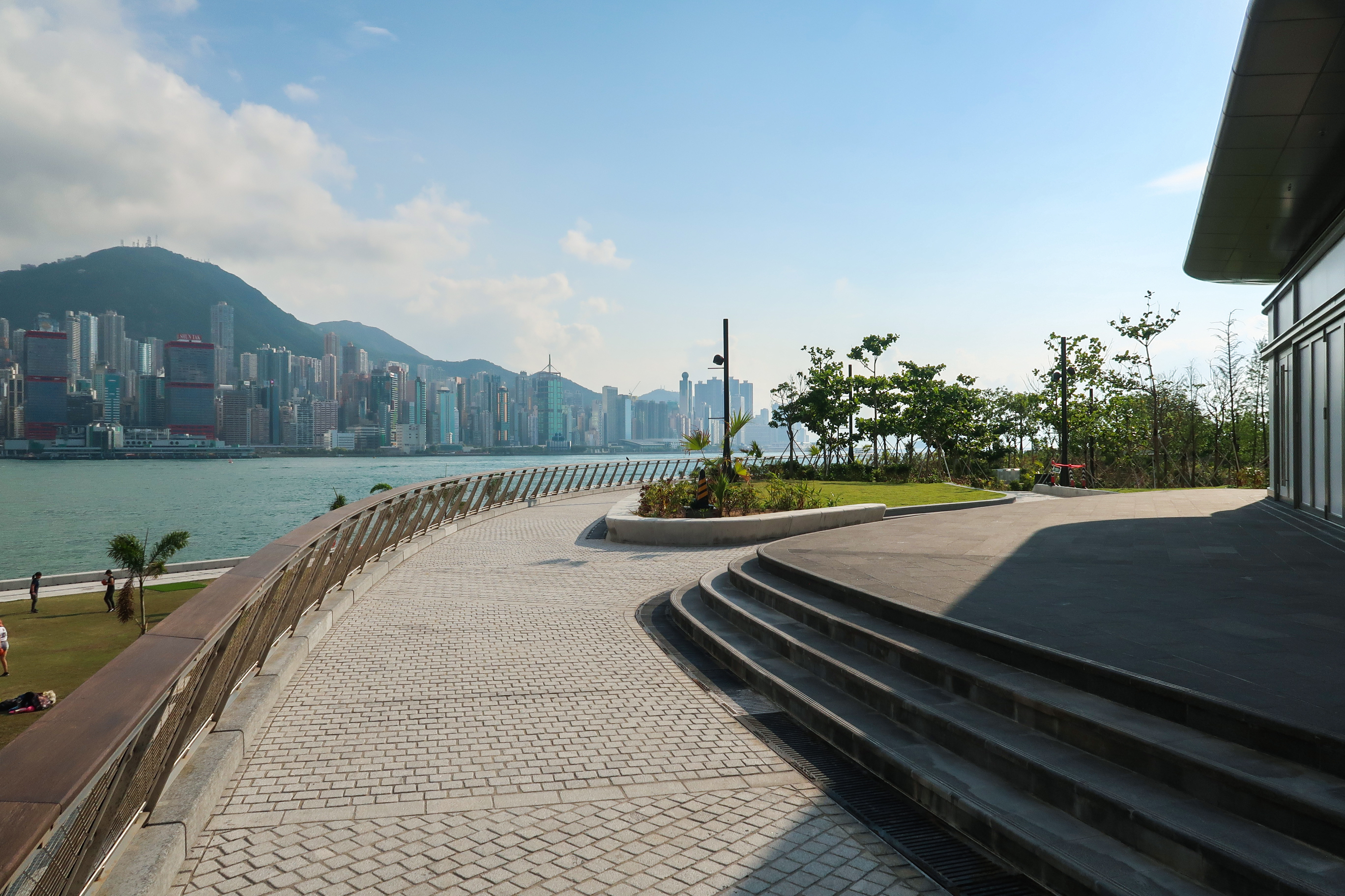 WKCD Art Park Upper deck